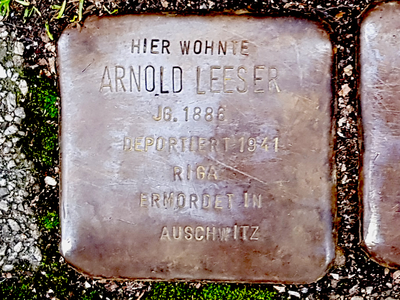 Stolperstein für Arnold Leeser, Schweizers. 15, Duisburg-Duissern